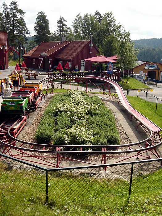 Dette er blant de korteste og laveste berg-og dalbanene i verden, kanskje også den minste. Åpnet i 1996.